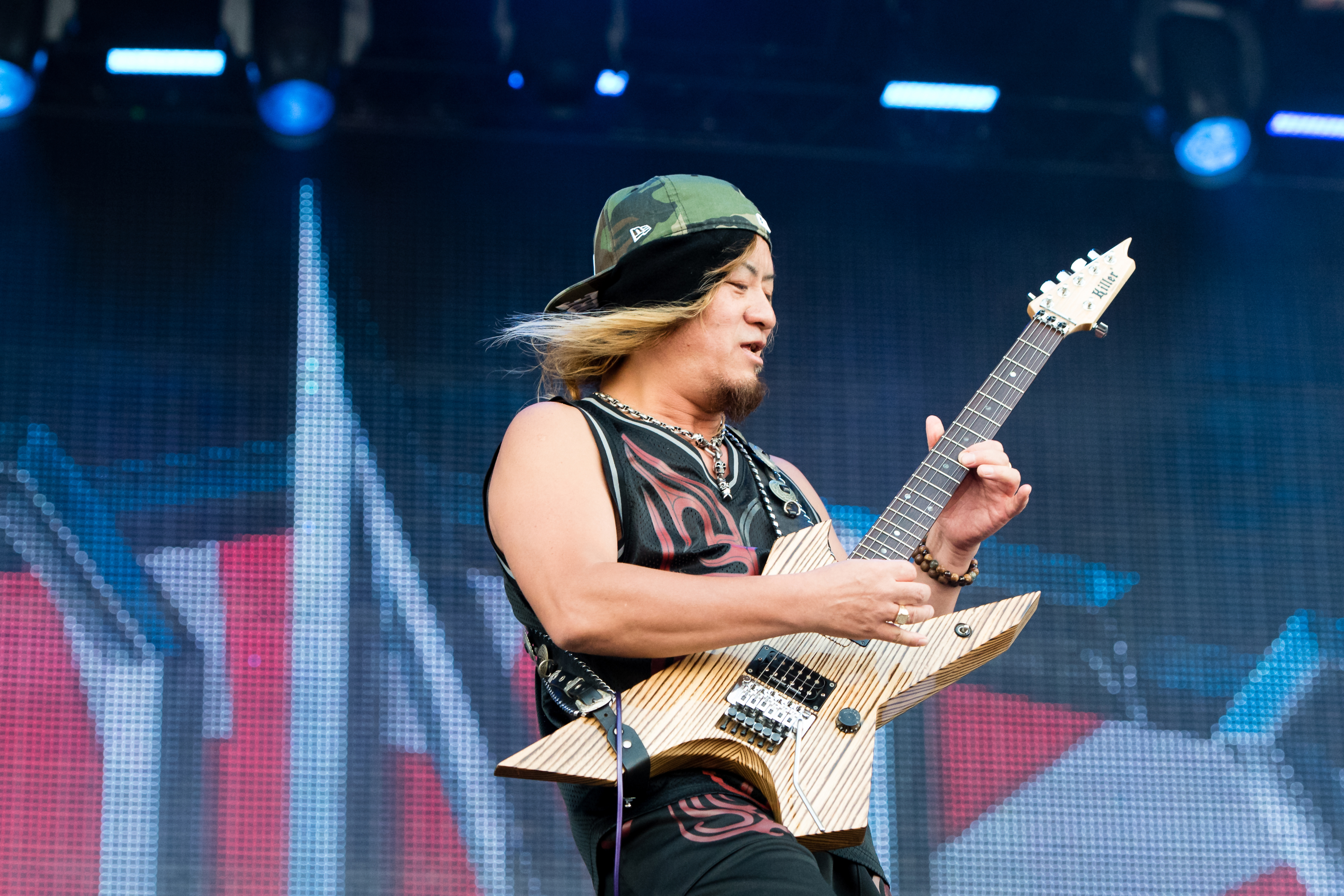 Loudness beim Wacken Open Air 2016